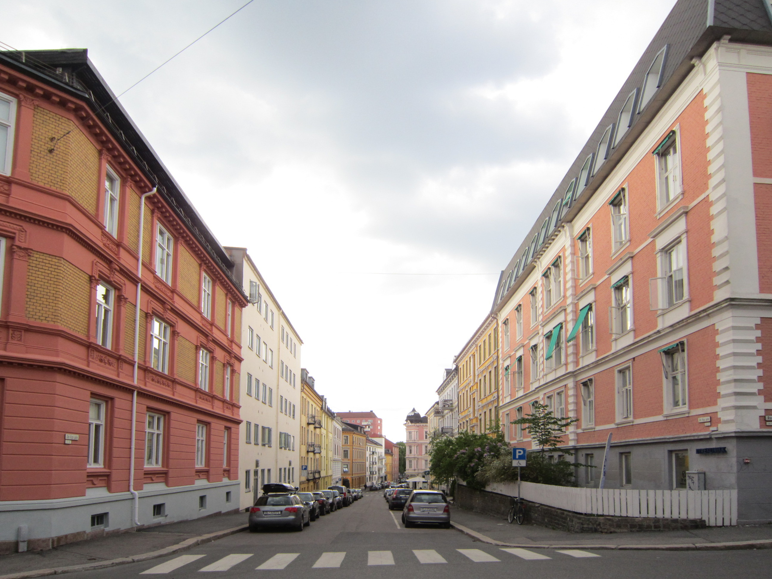 Ole Vigs gate i Oslo